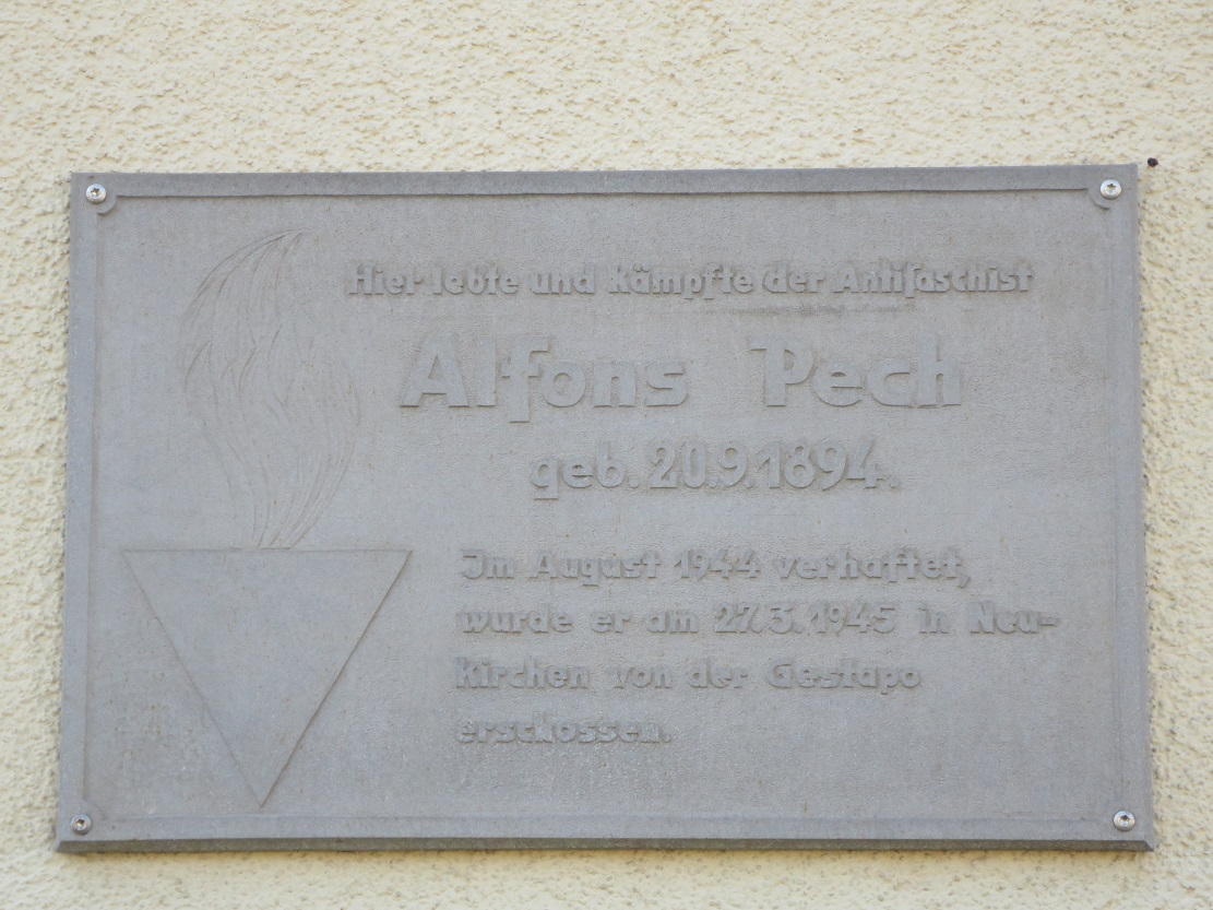 Kulturdenkmal Chemnitz Altendorf. Angebracht an der Nummer 43.